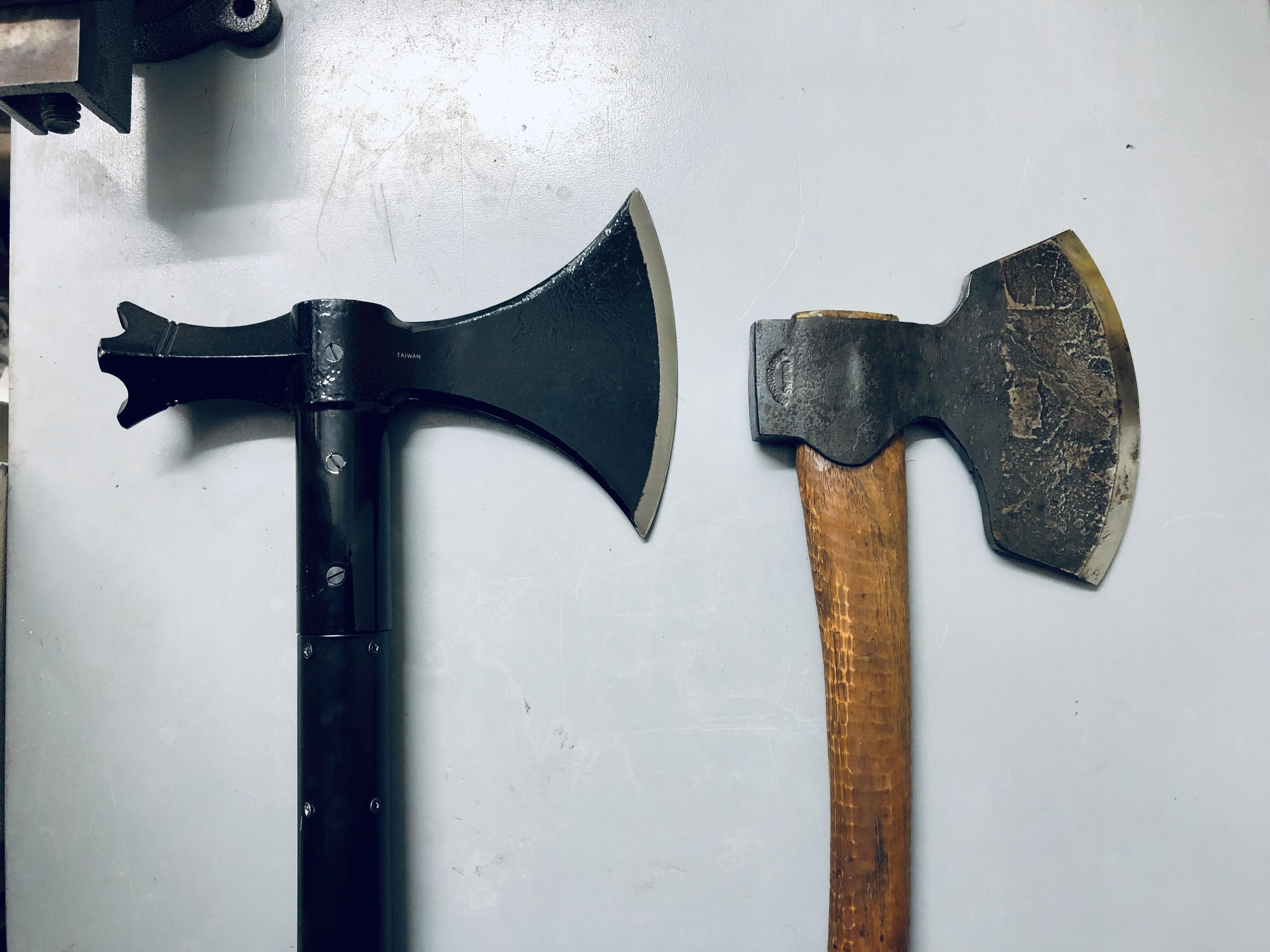 גרזן עבדוה וגרזן קרב